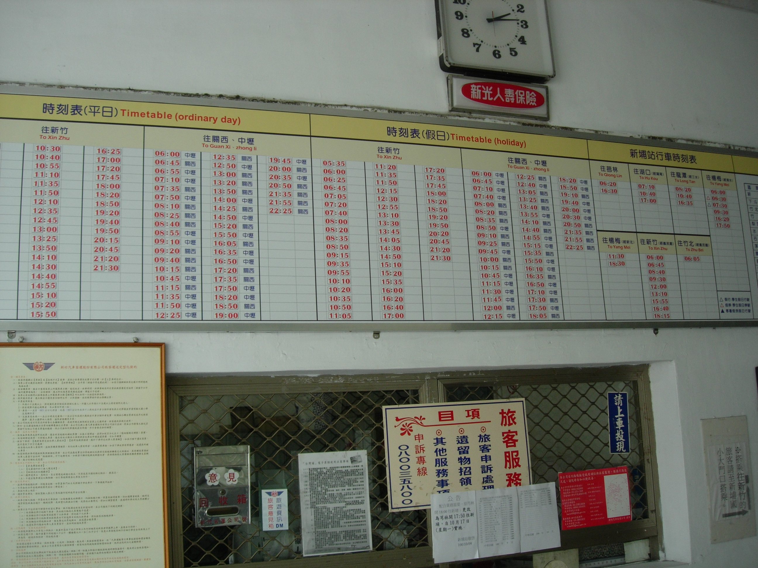 中文（台灣）: 新竹客運新埔站時刻表（中）與新光人壽廣告鐘（上）。